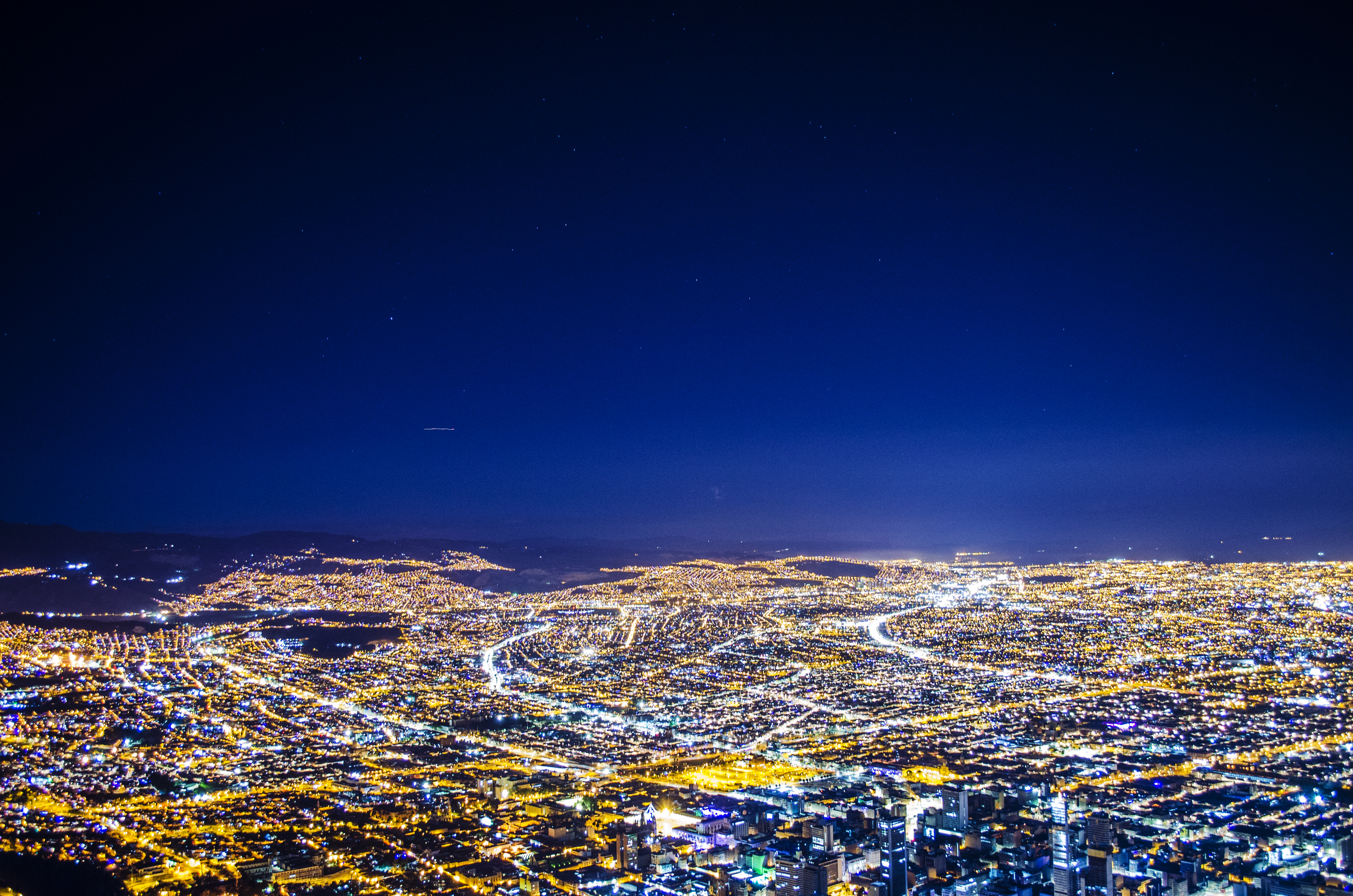 Bogota desde monserrate